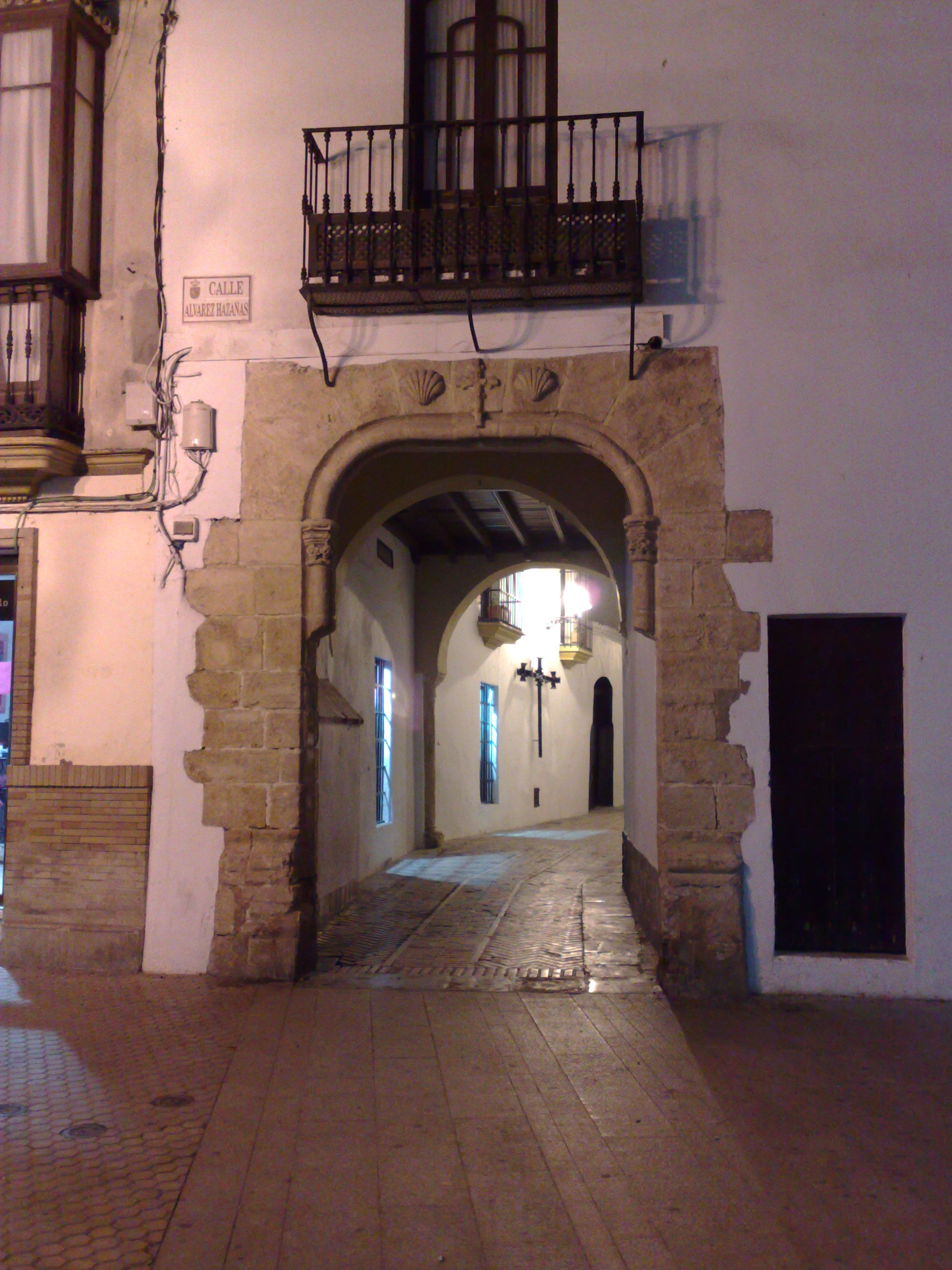 Pasaje del Niño Perdido, en Utrera (Sevilla), España